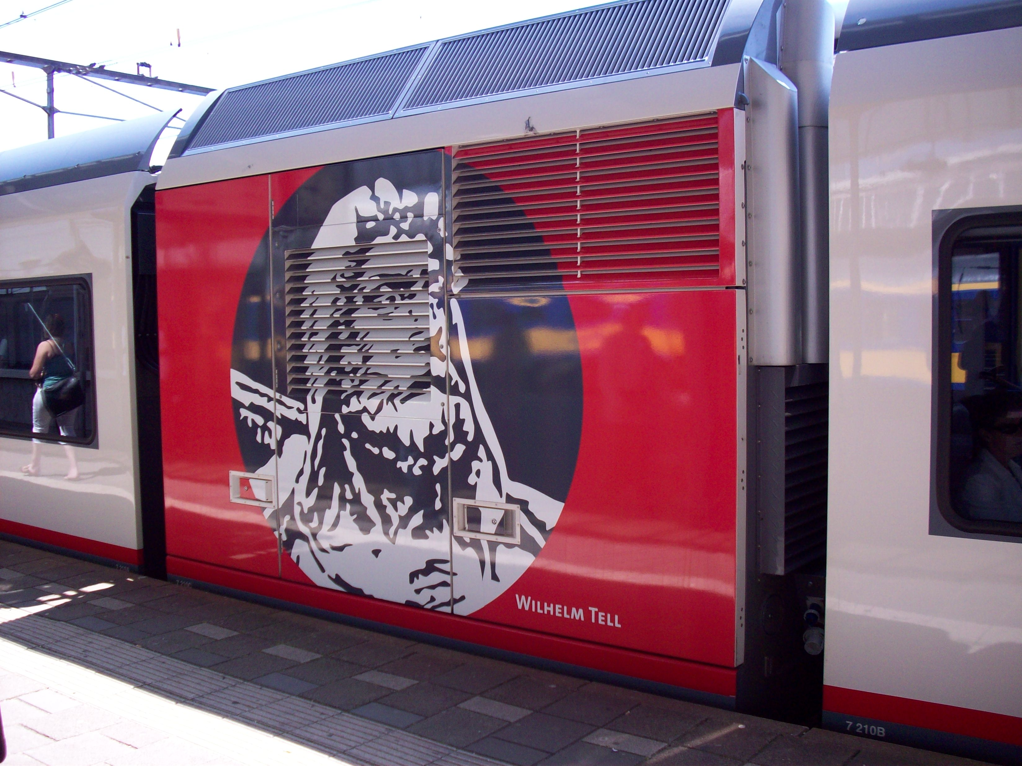 Velios GTW